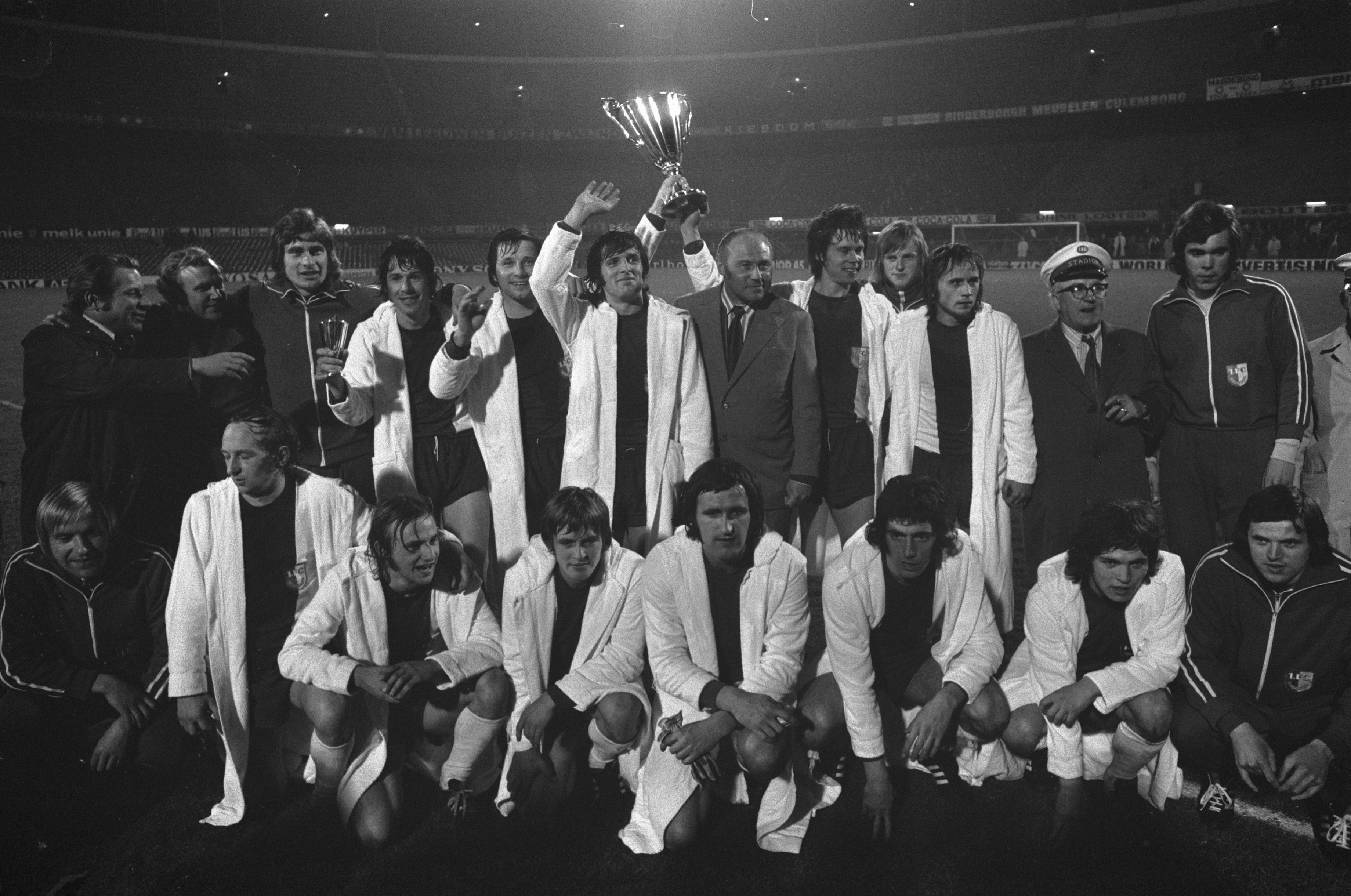 I giocatori del Magdeburgo sollevano il trofeo vinto contro il Milan